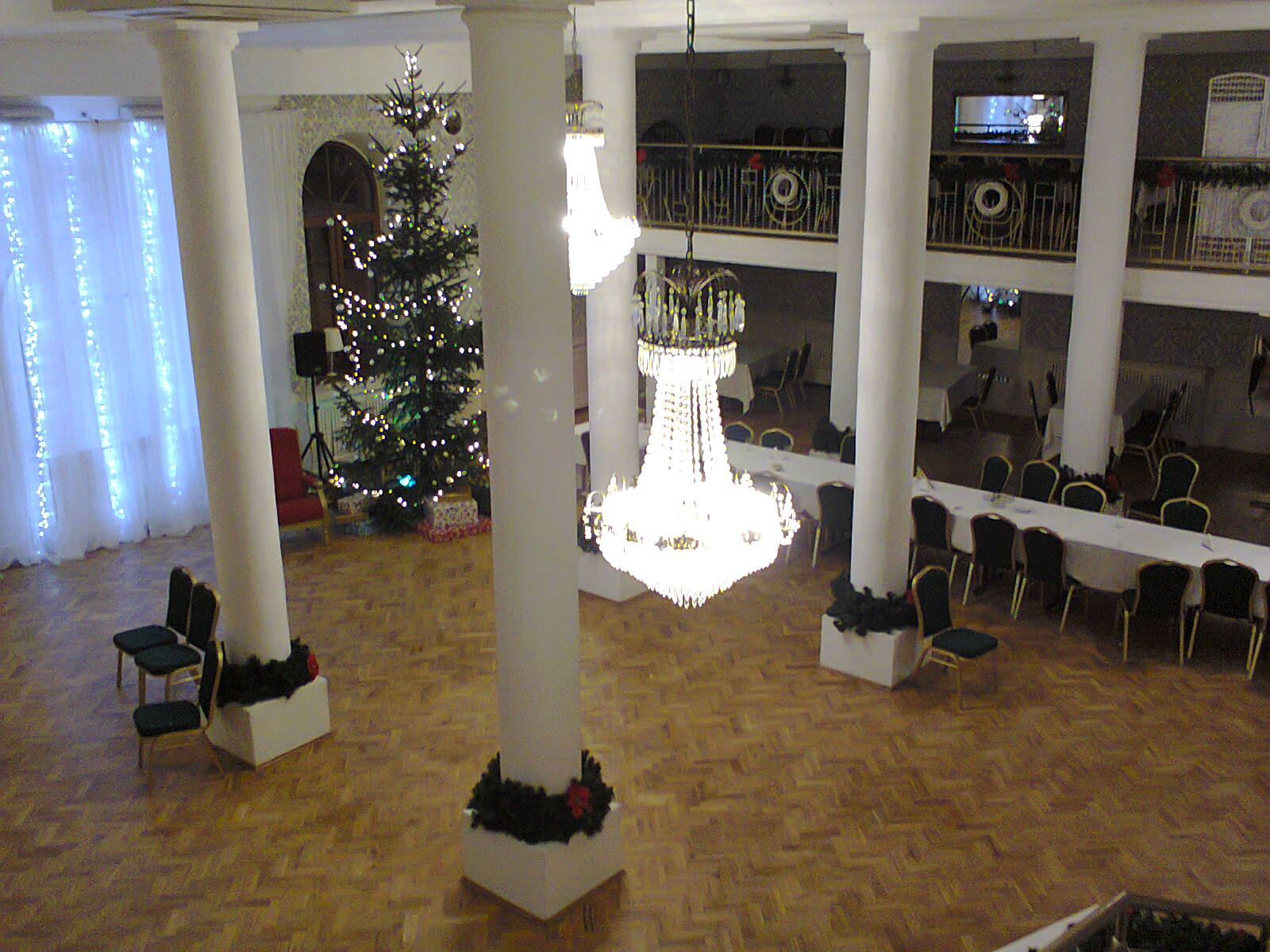 Jednoprzestrzenna sala modlitw - obecnie sala bankietowa w hotelu (dawnym budynku synagogi w Kolnie)